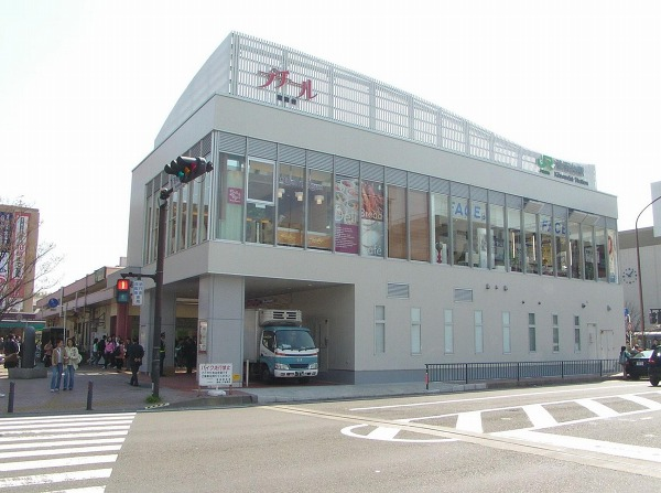 Konandai Station, Negishi Line, Konan-ku, Yokohama, Kanagawa, Japan (:)